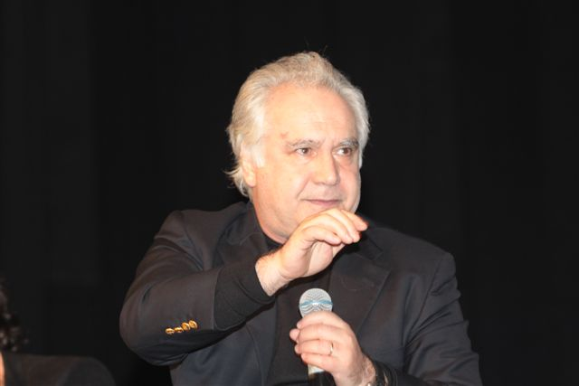 Mario Sconcerti (Firenze, 24 ottobre 1948) è un giornalista e scrittore italiano.